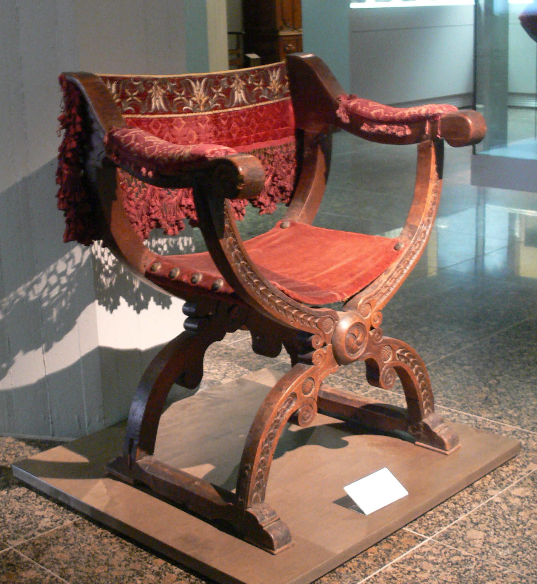 Faltlehnstuhl, Süddeutschland, Ende 16. Jahrhundert; Nussbaumholz geschnitzt, Rücken und Armlehnen mit rotem Samt überzogen, Goldstickerei und Quastenbehang (Bespannung des Sitzes später erneuert) Kunstgewerbemuseum Berlin, Inv. Nr. F 164